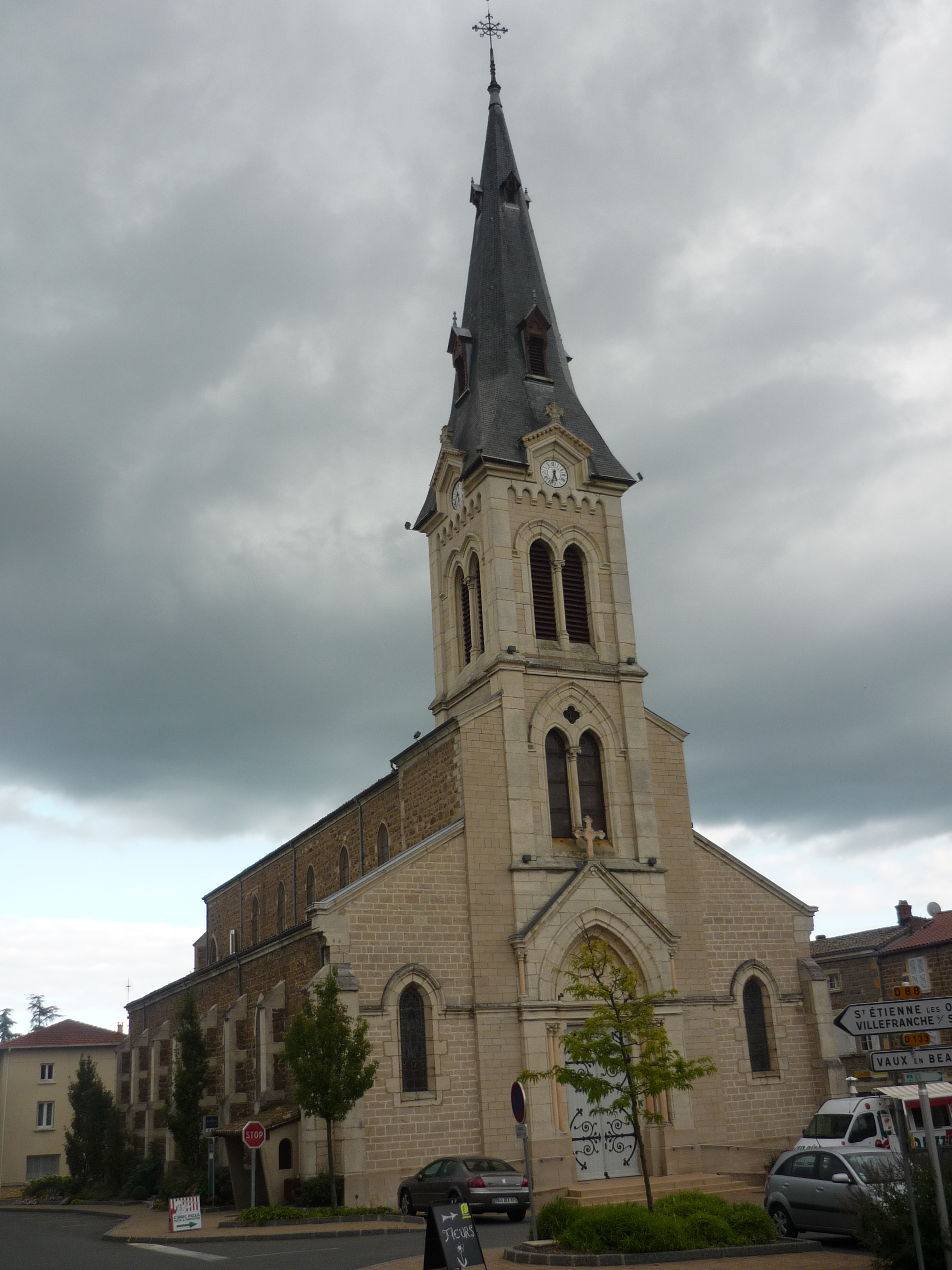 Die Kirche der französischen Gemeinde Le Perréon im Département Rhône.